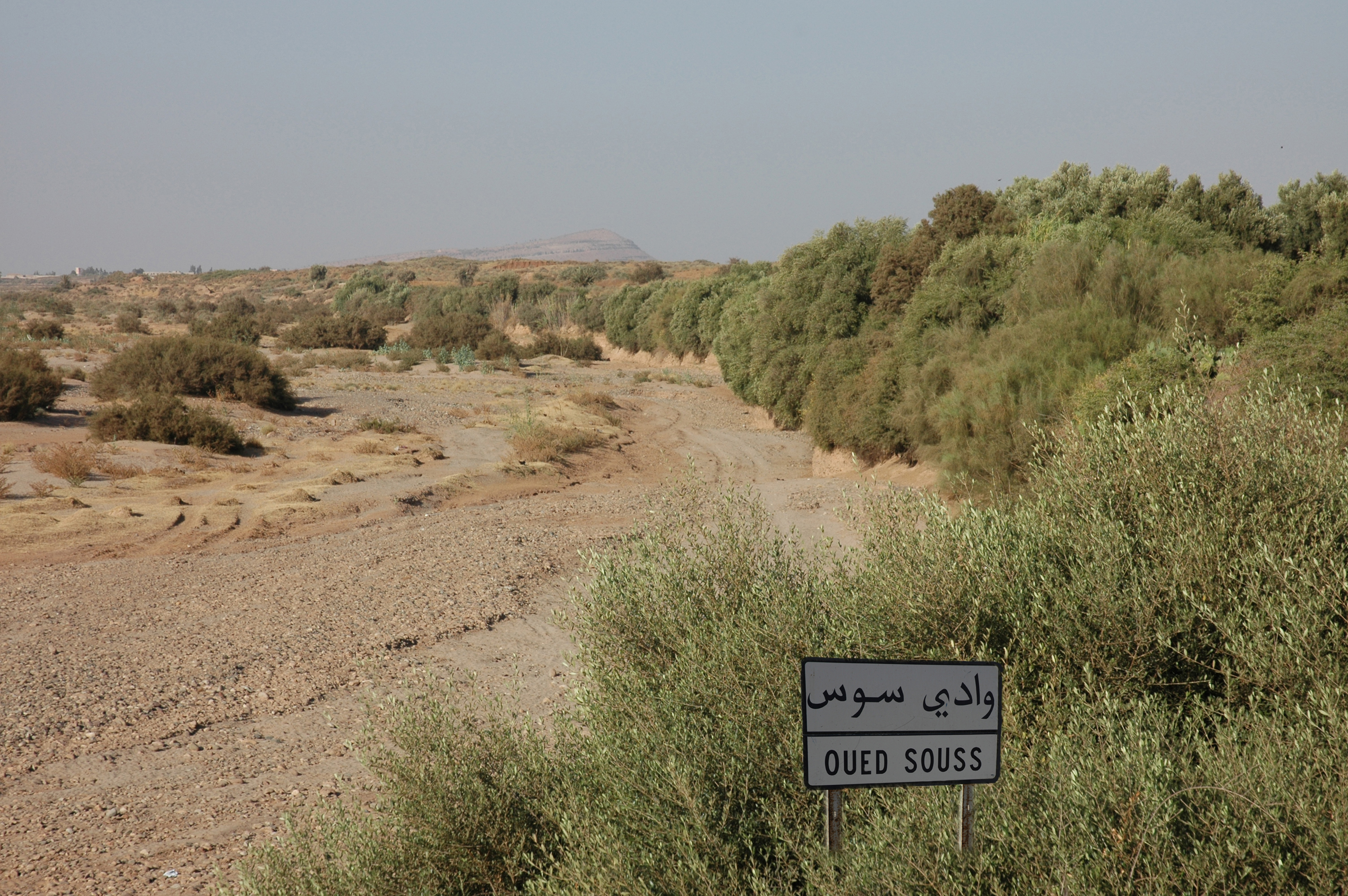 L'Oued Souss (Maroc).